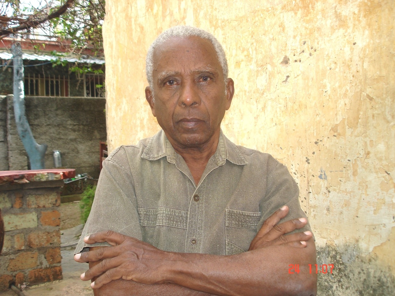 El poeta cubano Domingo Alfonso